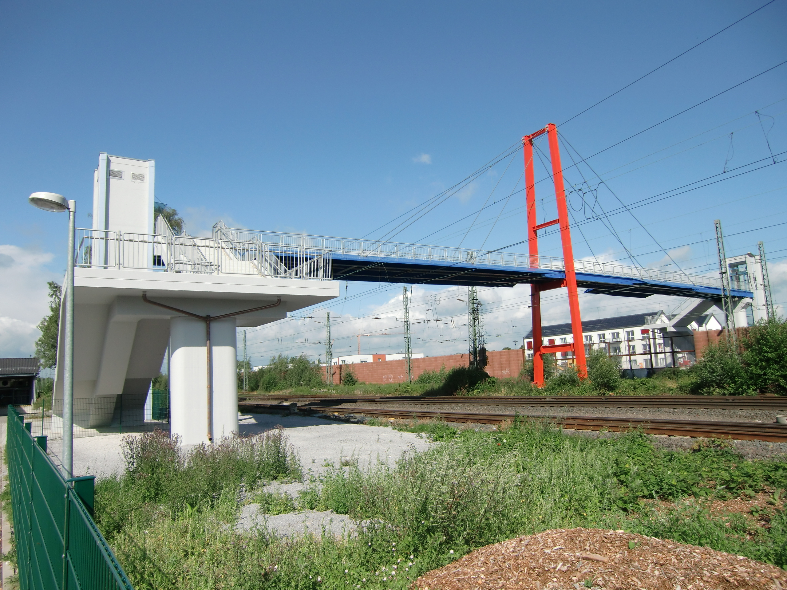 Moderne Fußgängerbrücke über DB-Gleise in Holzwickede